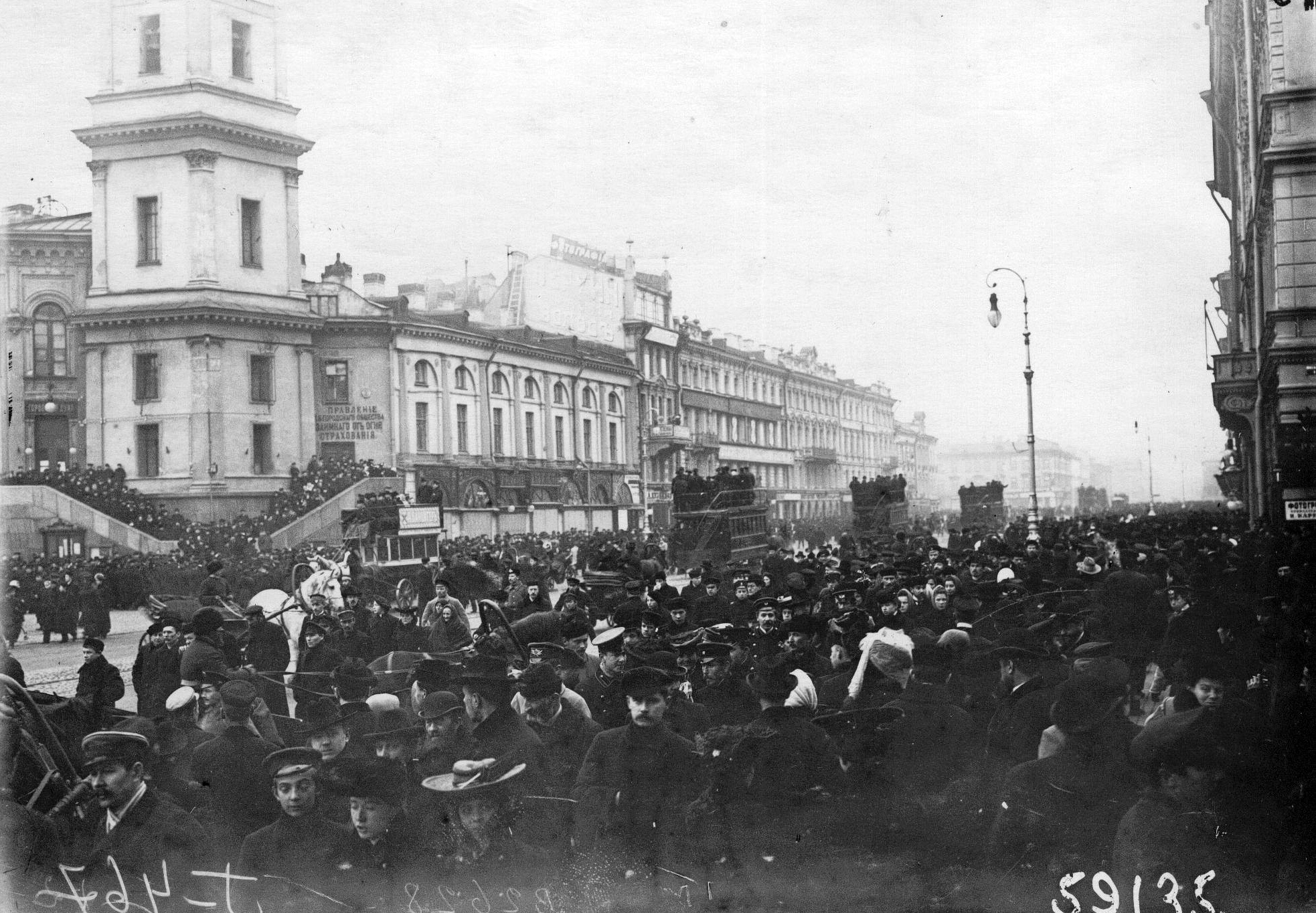 Манифестанты на Невском проспекте у здания городской думы (18 октября 1905)